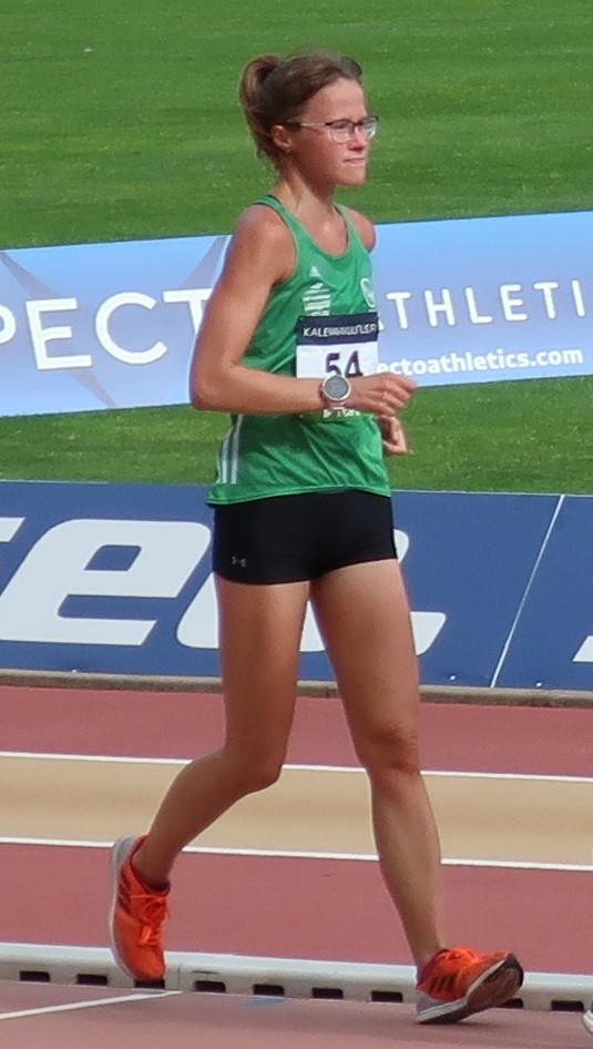 Tiia Kuikka 10 000 metrin kävelyssä Paavo Nurmen stadionilla Turussa vuoden 2020 Kalevan kisojen avauspäivänä.